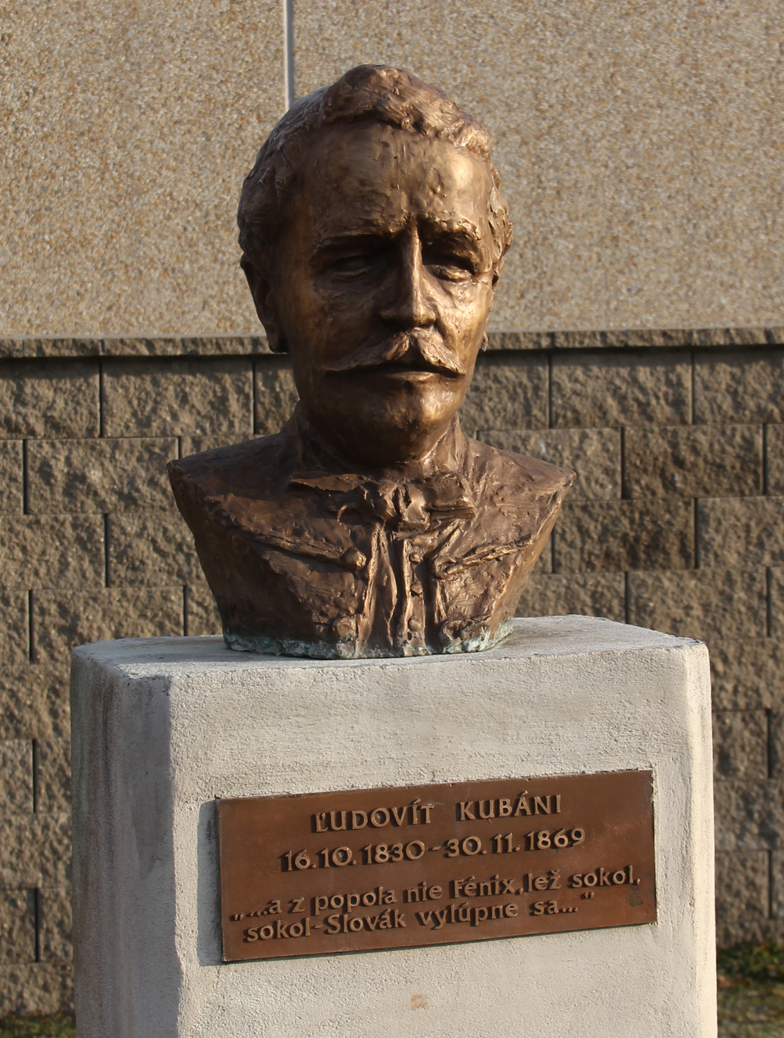 Bronzová busta slovenského básnika a prozaika Ľudovíta Kubániho na Námestí Štefana Marka Daxnera v Rimavskej Sobote